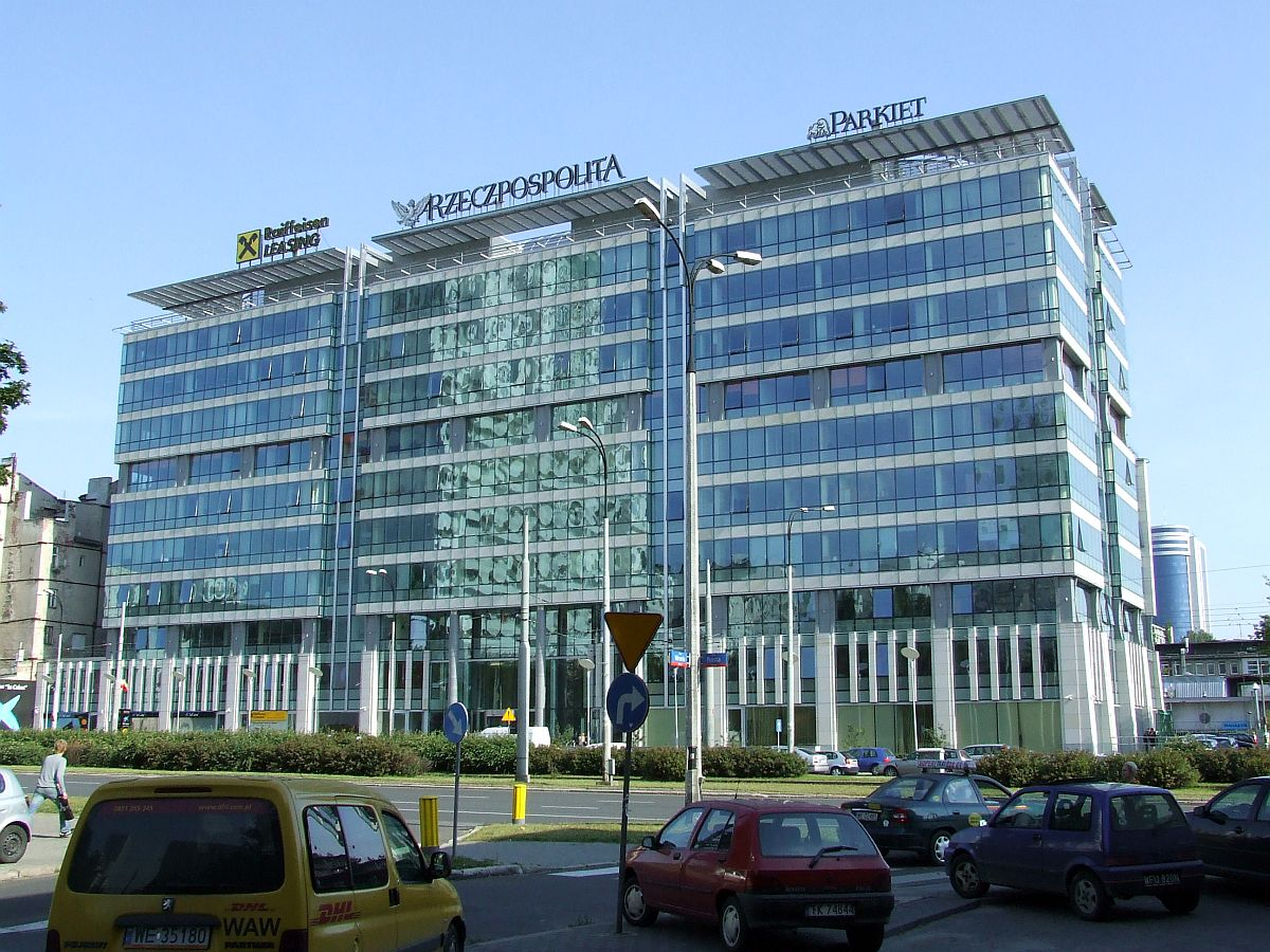 Warsaw, Rzeczpospolita (gazeta) headquater, Prosta Street